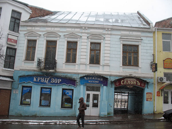 Віцебск. Суворава 4